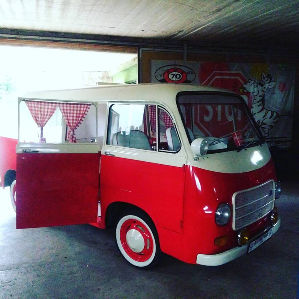 IMV 1600R u Bosni i Hercegovini